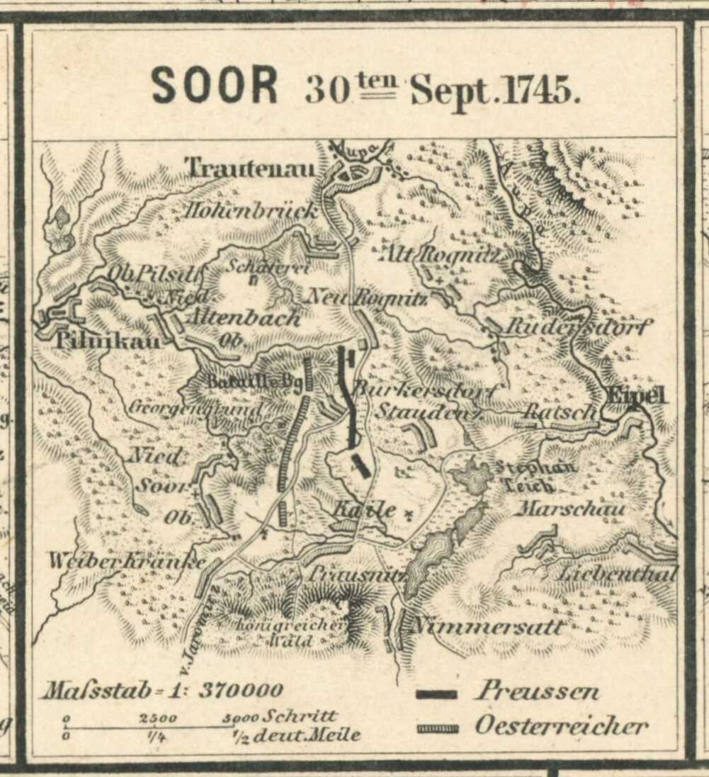 Schlachtplan von Soor